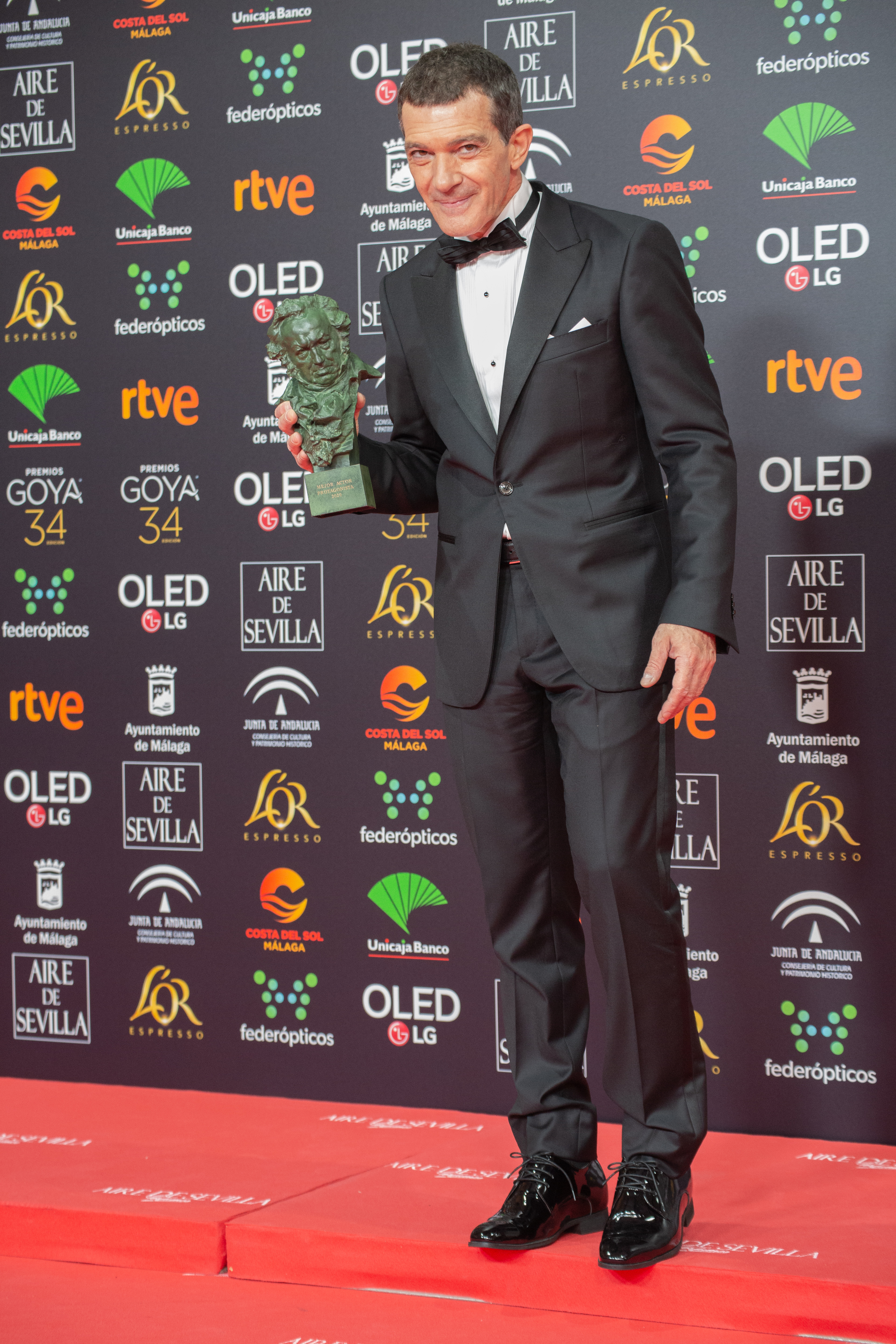 Antonio Banderas con su Goya a Mejor actor en la Gala de los Goya 2020